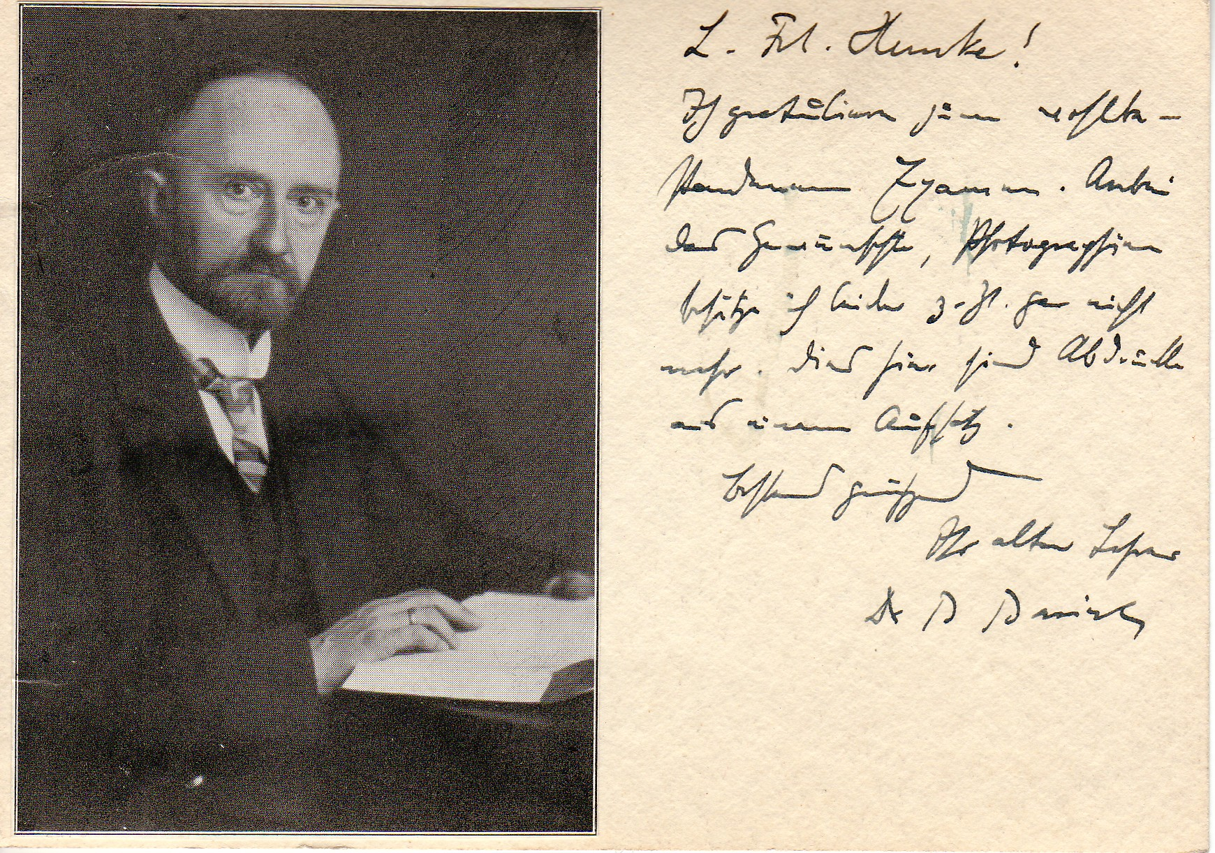 Von Bernhard Bavink einer handschriftlichen Postkarte beigefügte, aus einer Publikation stammende Reproduktion eines seiner Fotos, Postkarte aus dem Jahr 1937.